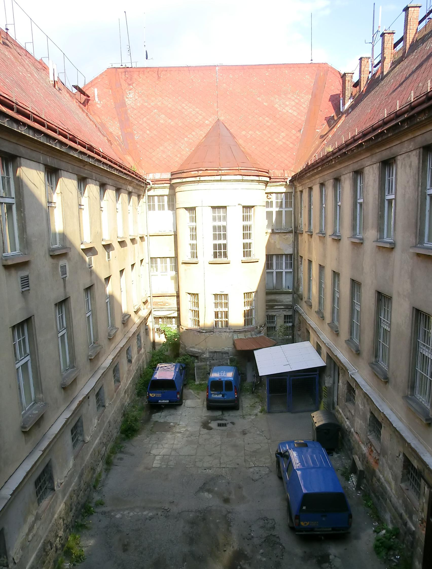 Budova pošty (bývalého Okresního soudu) v Jilemnici - nádvoří se služebními auty České pošty